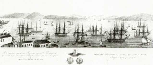 Гравюра с видом эскадры Черноморского флота в Босфоре «Соотечественникам в воспоминание пребывания Российского флота в Босфорском проливе под командою вице-адмирала Лазарева». Гравюра 1830-х гг.